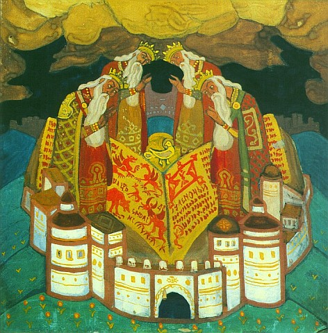 Книга Голубиная (Помин о четырех королях). 1911. Картон, темпера. 46x46 см. Смоленский музей изобразительного и прикладного искусства